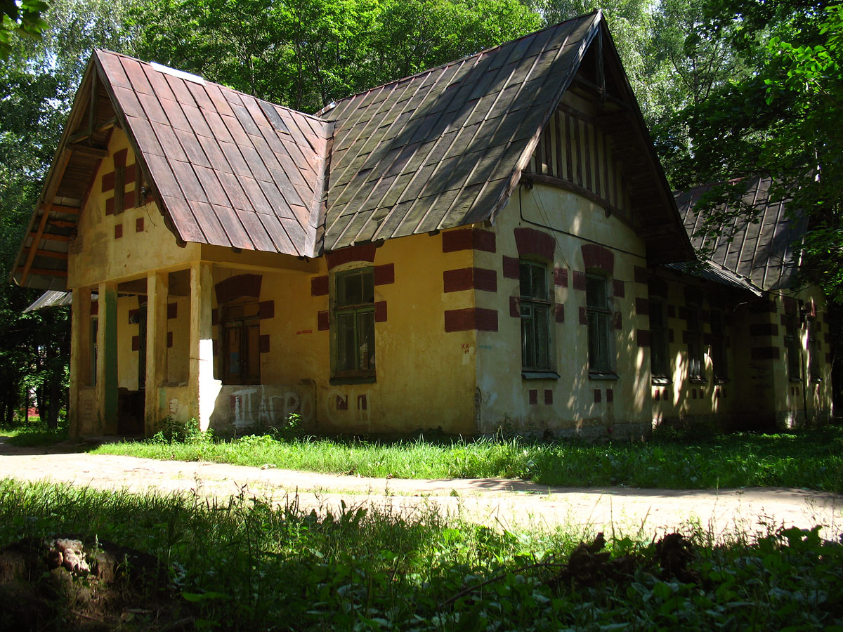 Беларуская (тарашкевіца): Лужасна